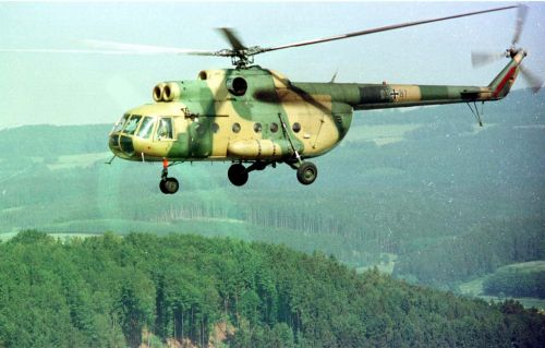 Mi-8 der Bundeswehr auf einem Flug zum Truppenübungsplatz Hammelburg in Bayern